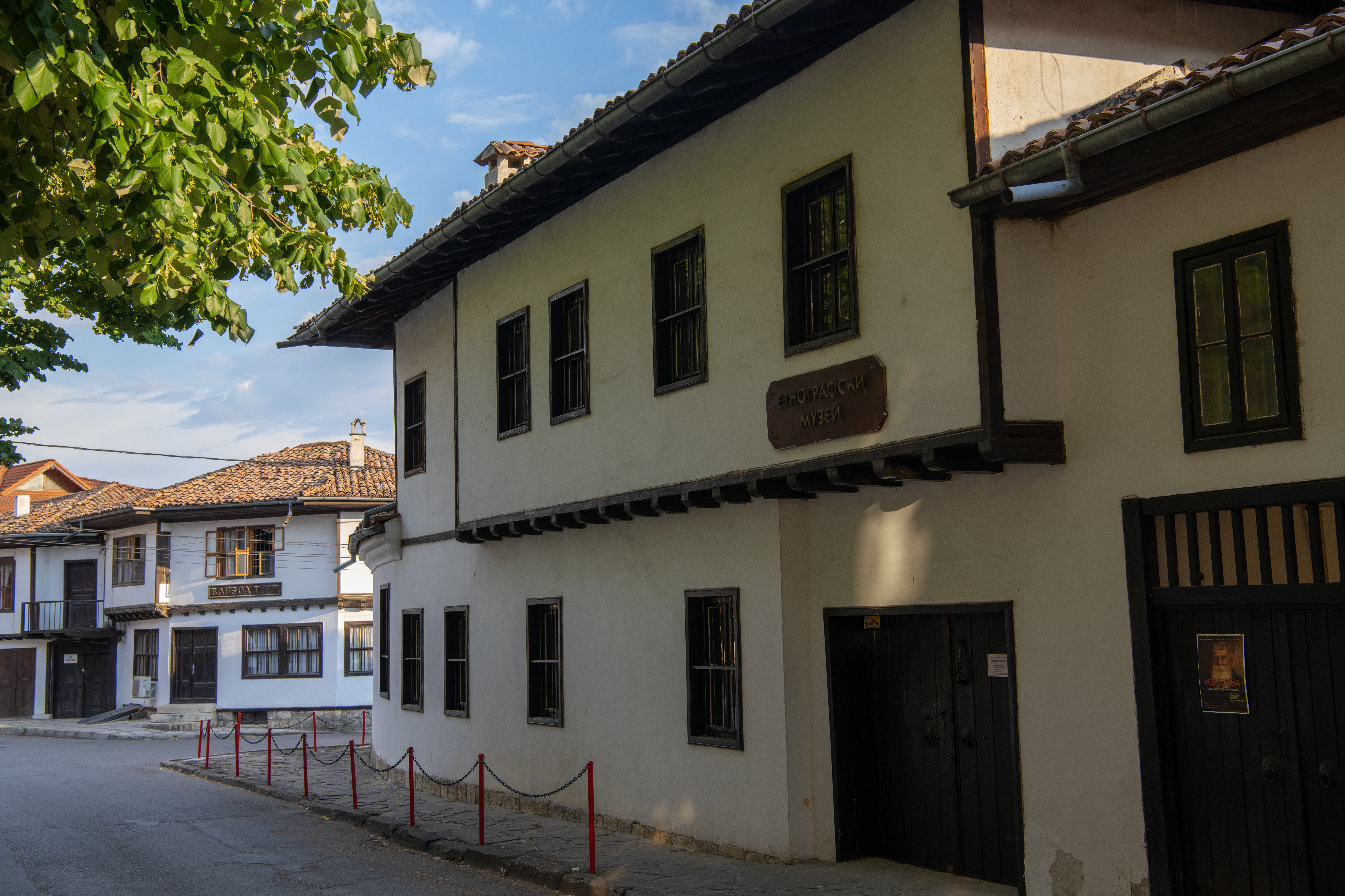 Снимката документира етнографския музей в град Разград.